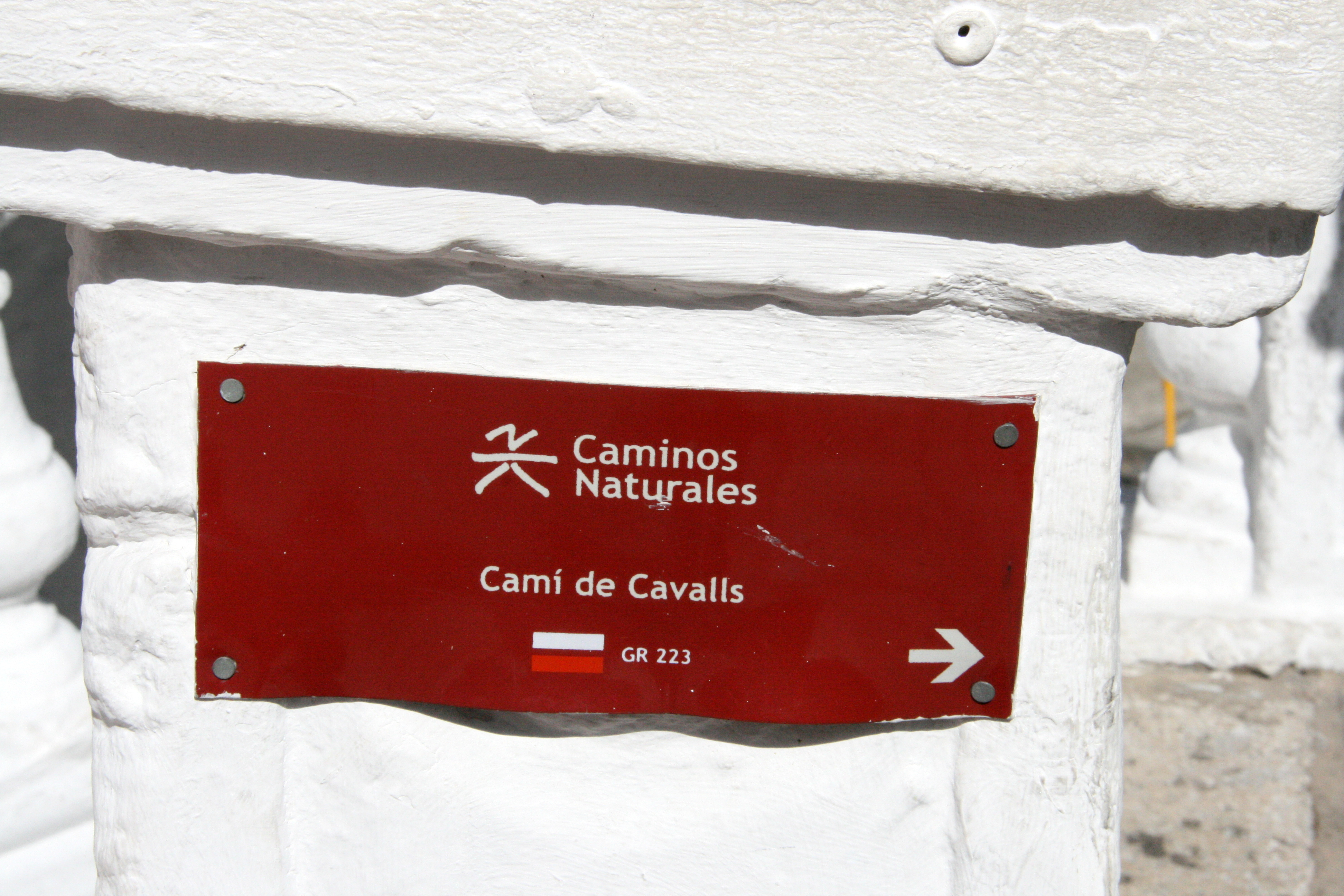 Indicador del camí de Cavalls en la costa de Ses Voltes de Maó